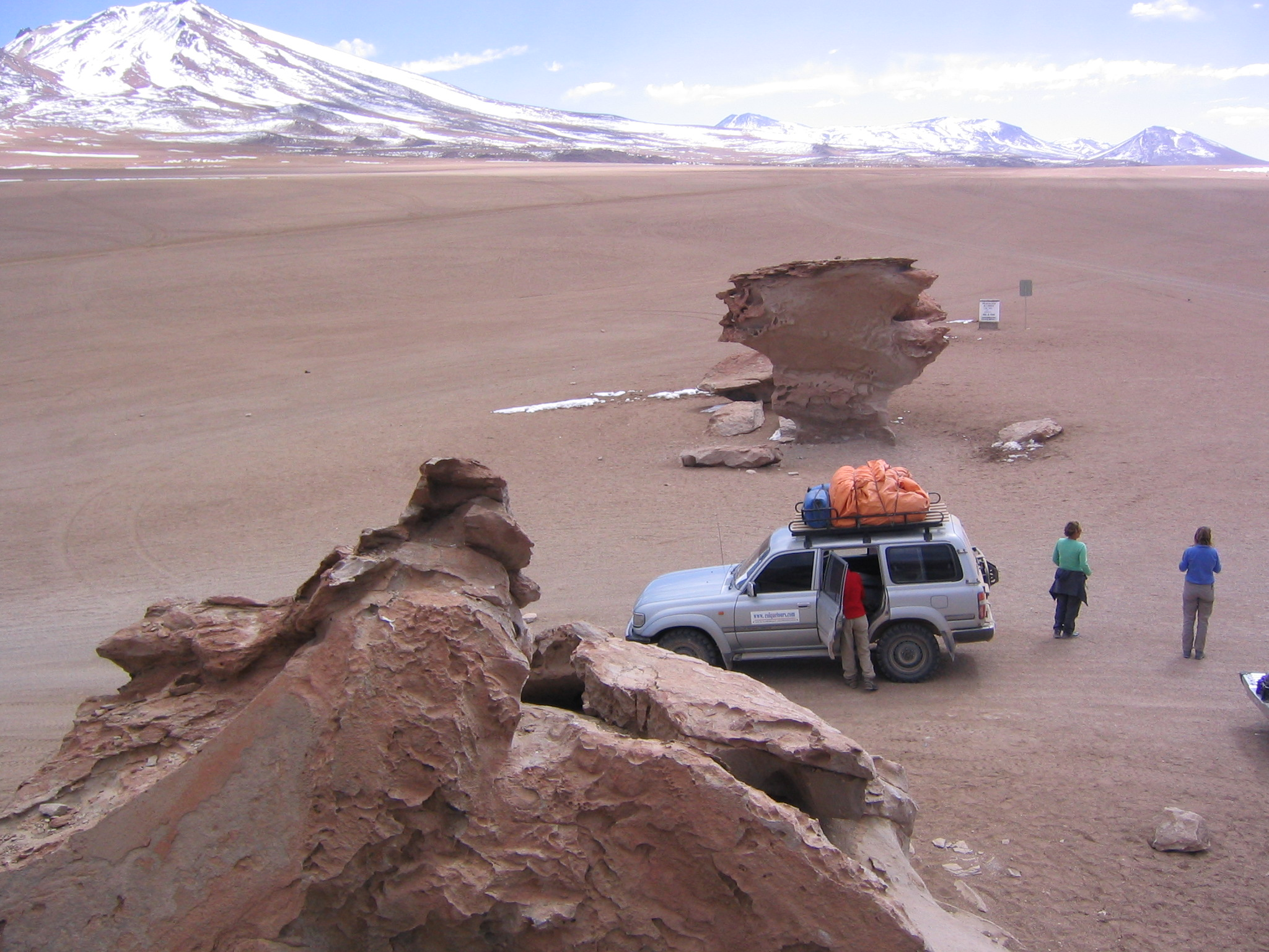 Desierto de Siloli en el departamento de Potosí, Bolivia.